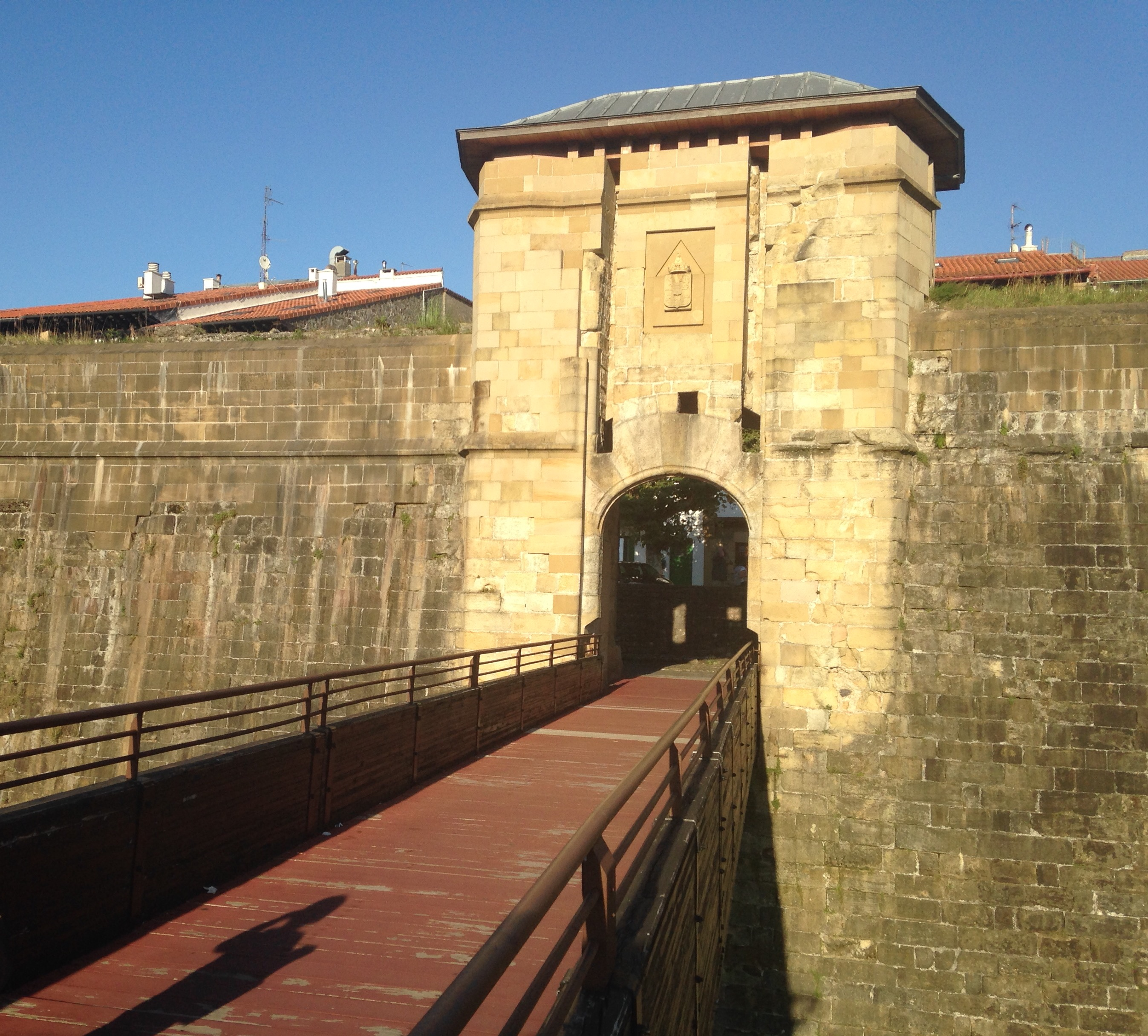 San Nikolas atea, Hondarribiko harresiak (Hondarribia, Gipuzkoa)